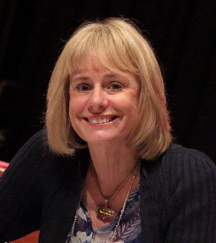 Författarinnan Kathy Reichs på en författarträff i Australien, september 2013.